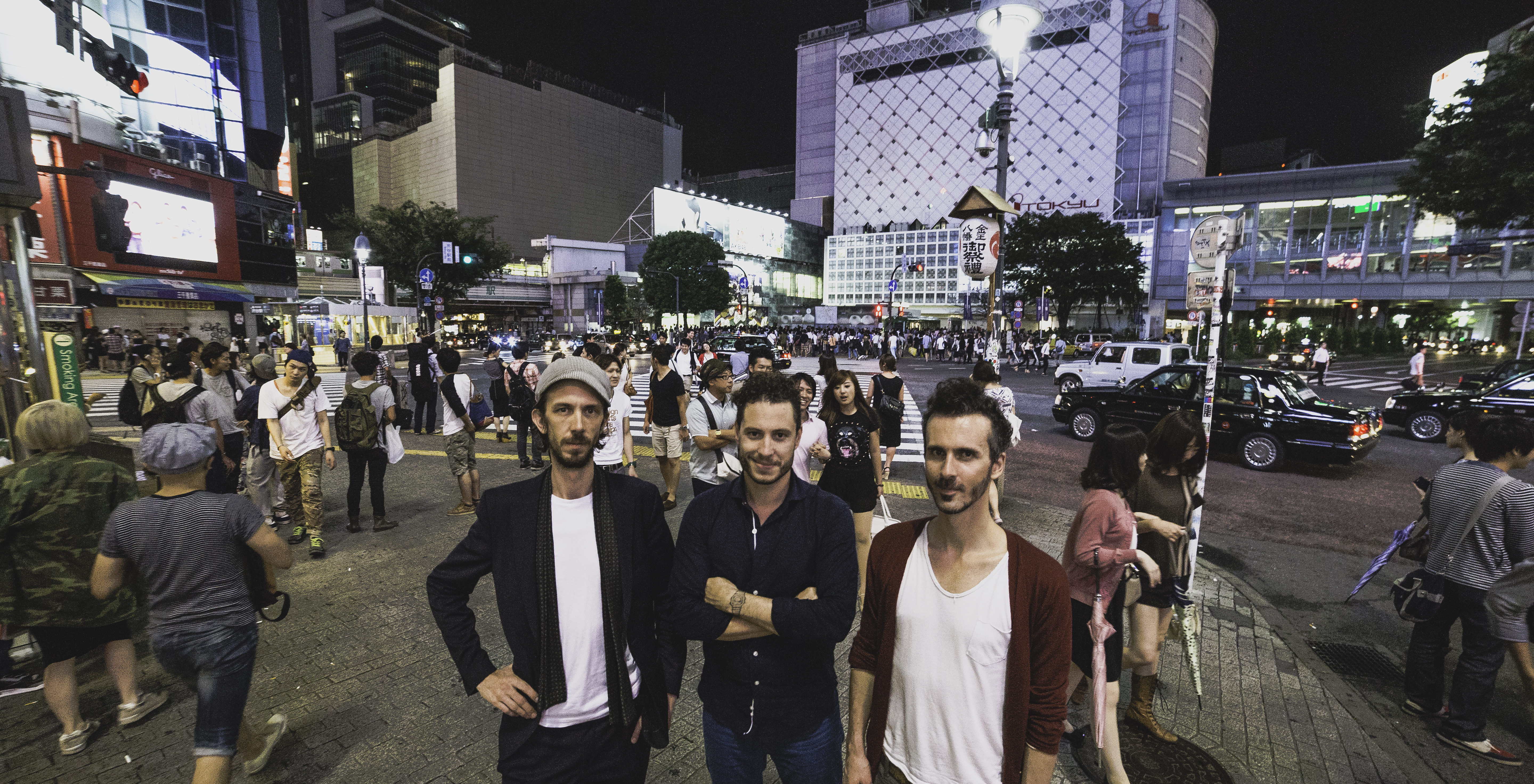 2013年ジャパン・ツアーにて。